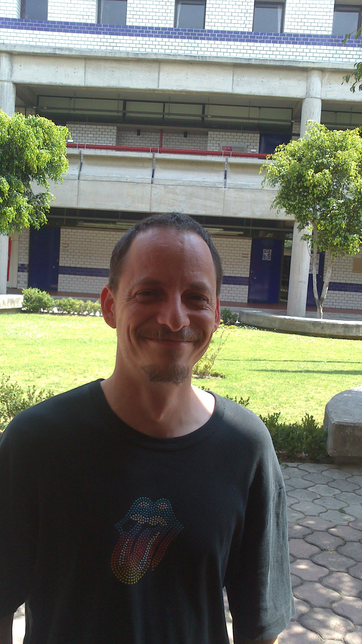 Foto de el profesor Luis Felipe Lomelí